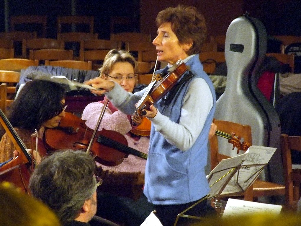 Anne-Claude Villars, dirigeant l'Orchestre de Chambre de Versailles